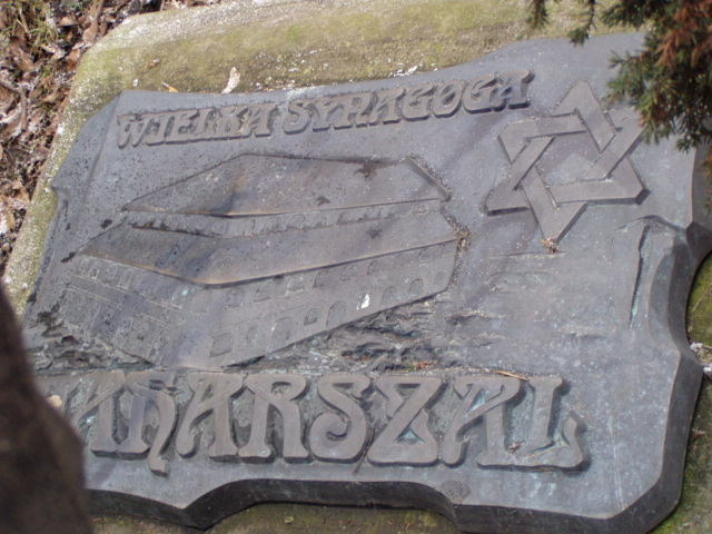 Lublin-Synagoga Maharszala Autor: Slav